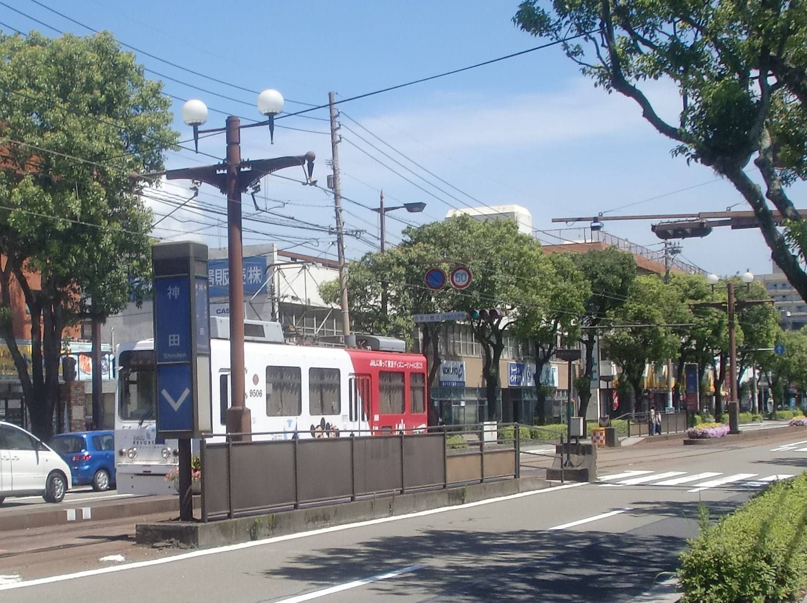 神田電停（しんでんでんてい）の外観